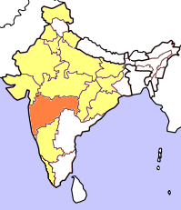 Kartorna bygger på resultat i senaste delstatsval (Juni 2004). Rött betyder att partiet deltar i delstatsregeringen, orange att partiet vann mandat i senaste delstatsvalet och gult att partiet hade lanserat kandidater men utan att vinna mandat. Kartorna tar inte hänsyn till avhopp, partifusioner och fyllnadsval under den ordinarie mandatperiodens gång. Gjord av Soman.